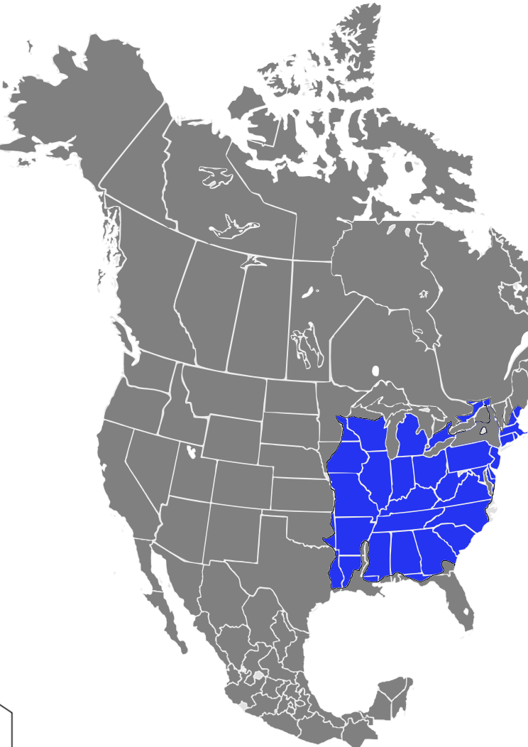 Die Verbreitung der Amerikanischen Weiß-Eiche.